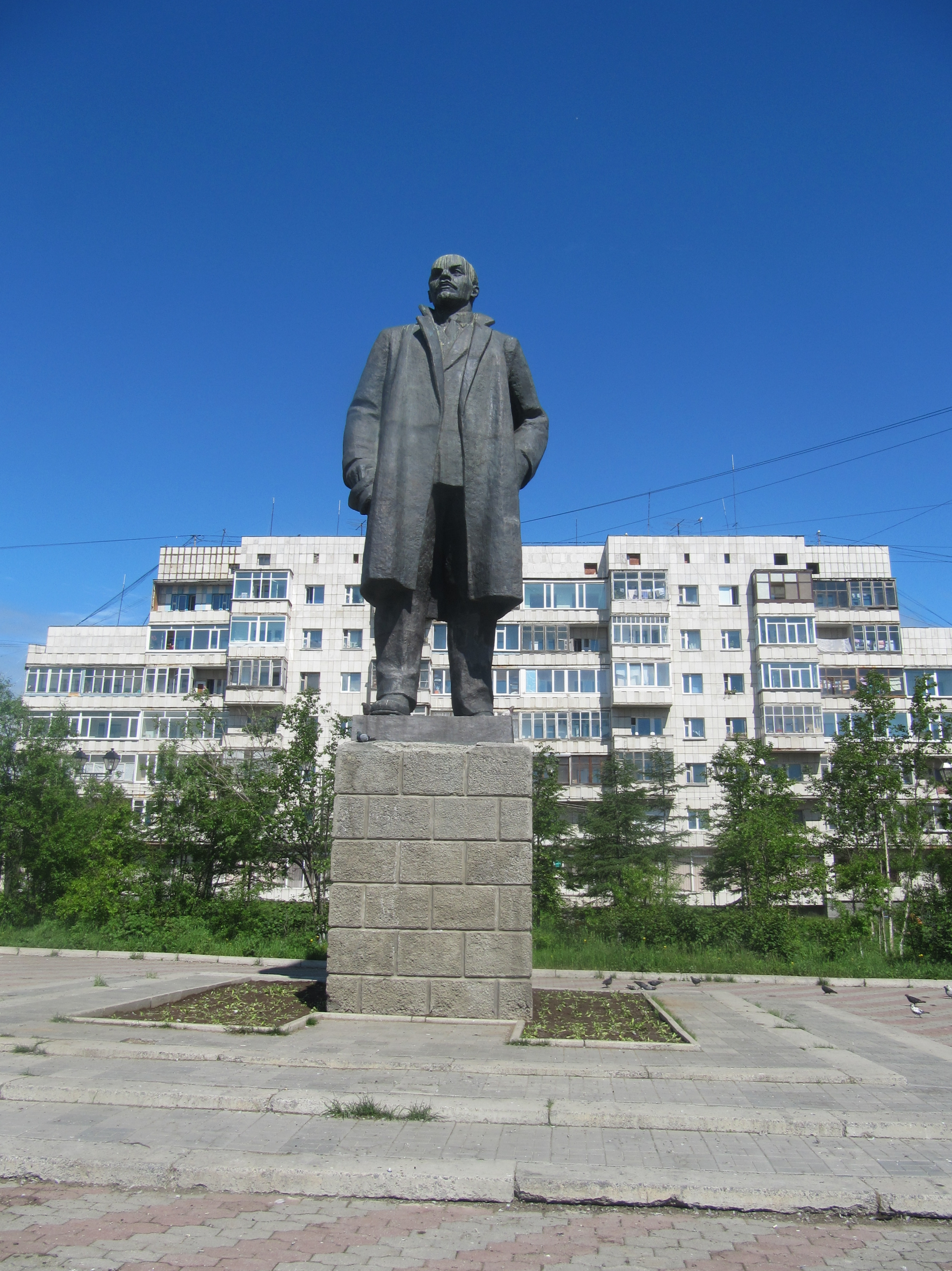 Lenin in Magadan